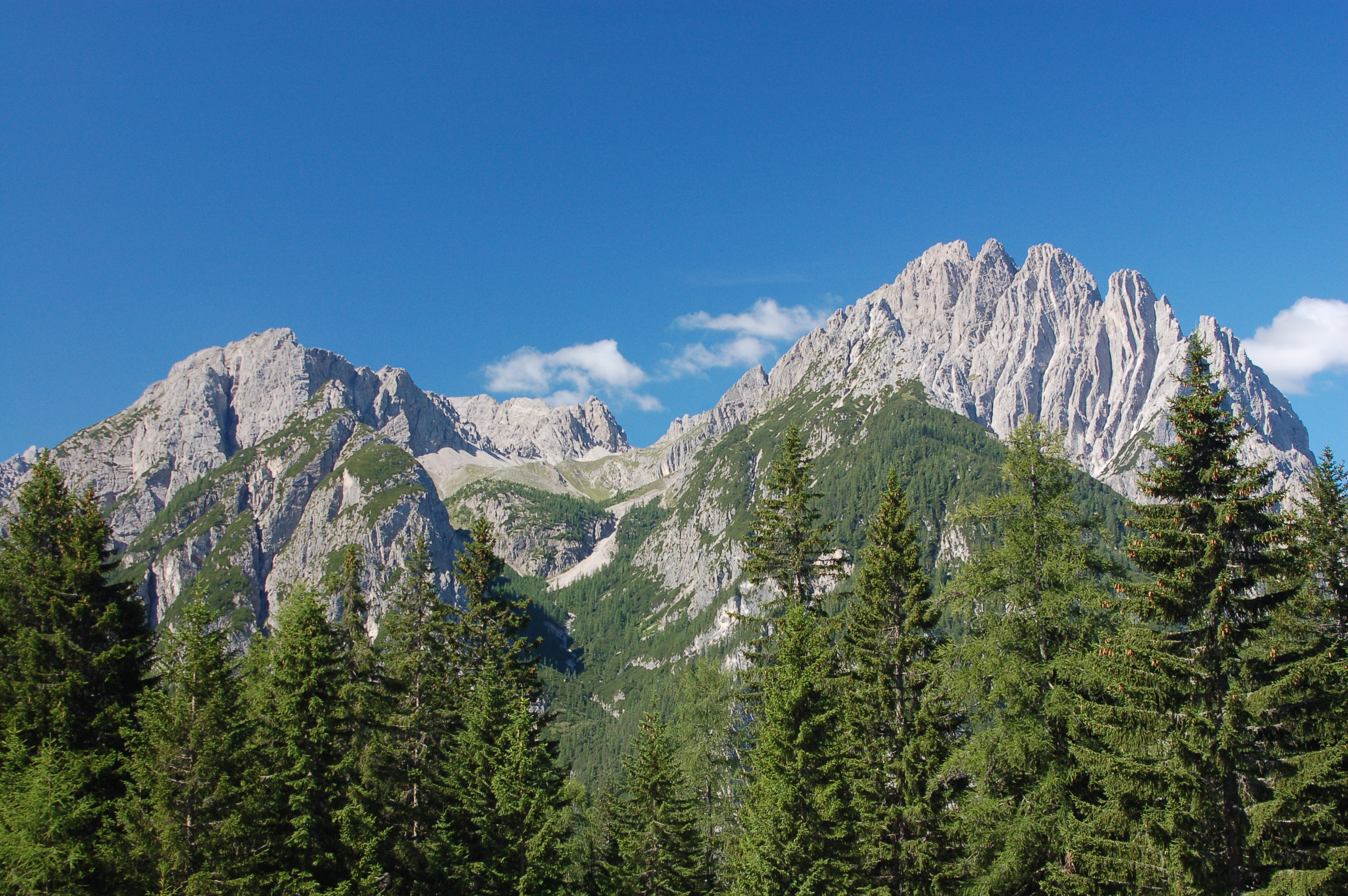 Kreuzkofel (links) und Spitzkofel (rechts), gesehen vom Parkplatz der Lienzer-Dolomiten-Hütte